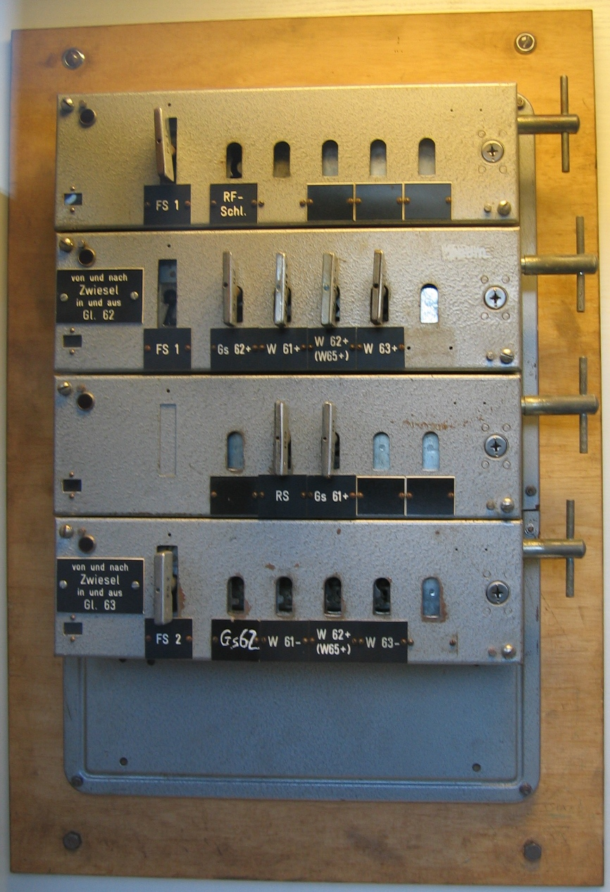 Aus mehreren Daum-Schlüsselsperren zusammengesetztes Schlüsselwerk im Bahnhof Bayrisch Eisenstein